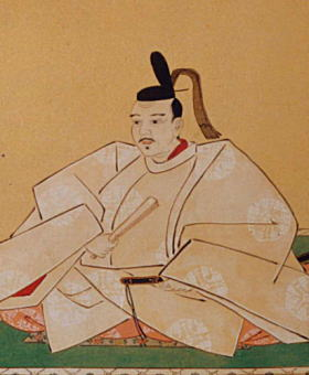 池田輝政画像（林原美術館蔵）